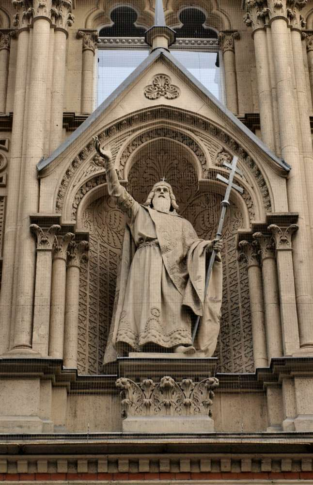 Pázmány Péter Katolikus Egyetem, főalak Szent István szobra (Senyei Károly, 1898) (Budapest, VIII. ker., Szentkirályi utca 28-30.)